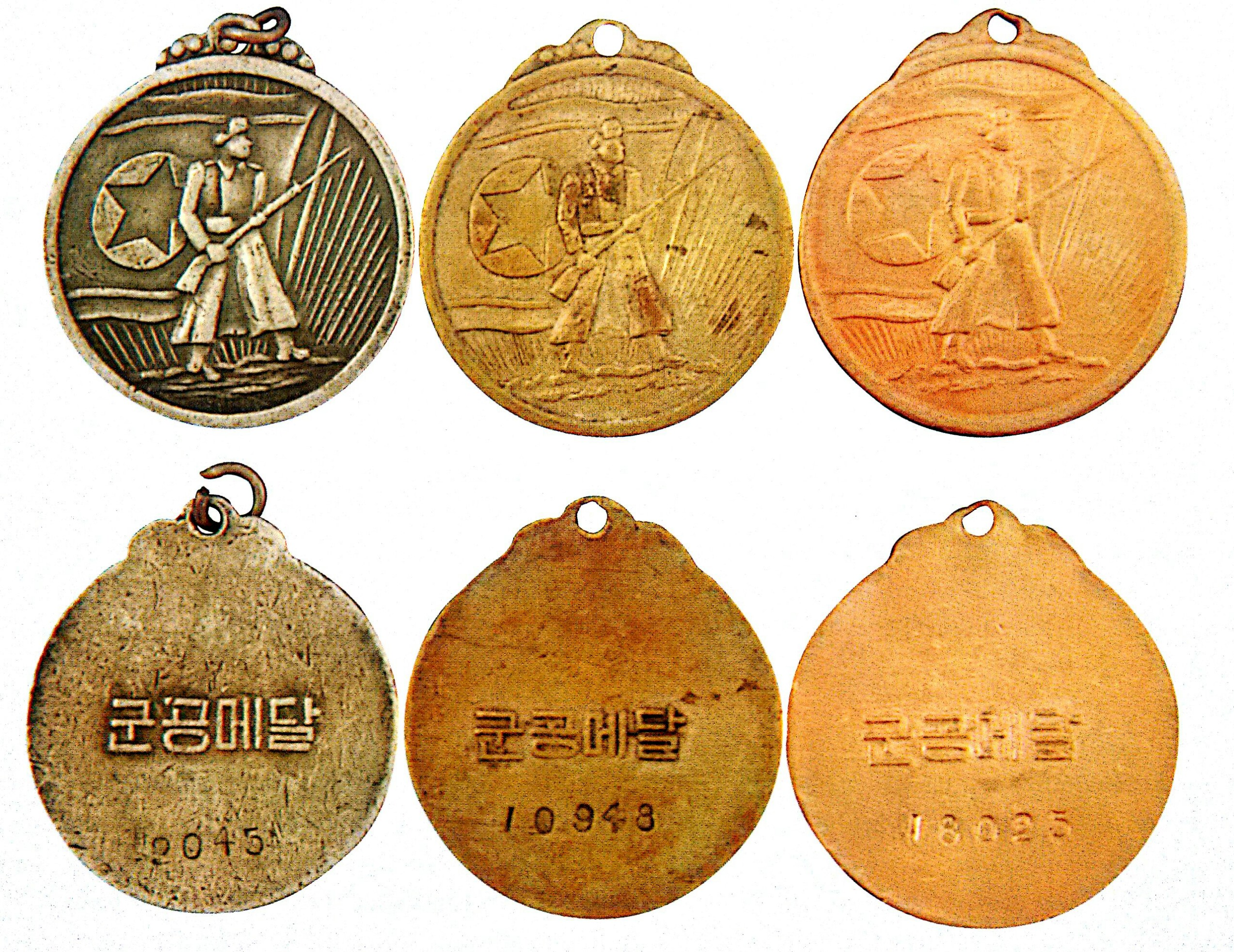 1949 military merit medal variation